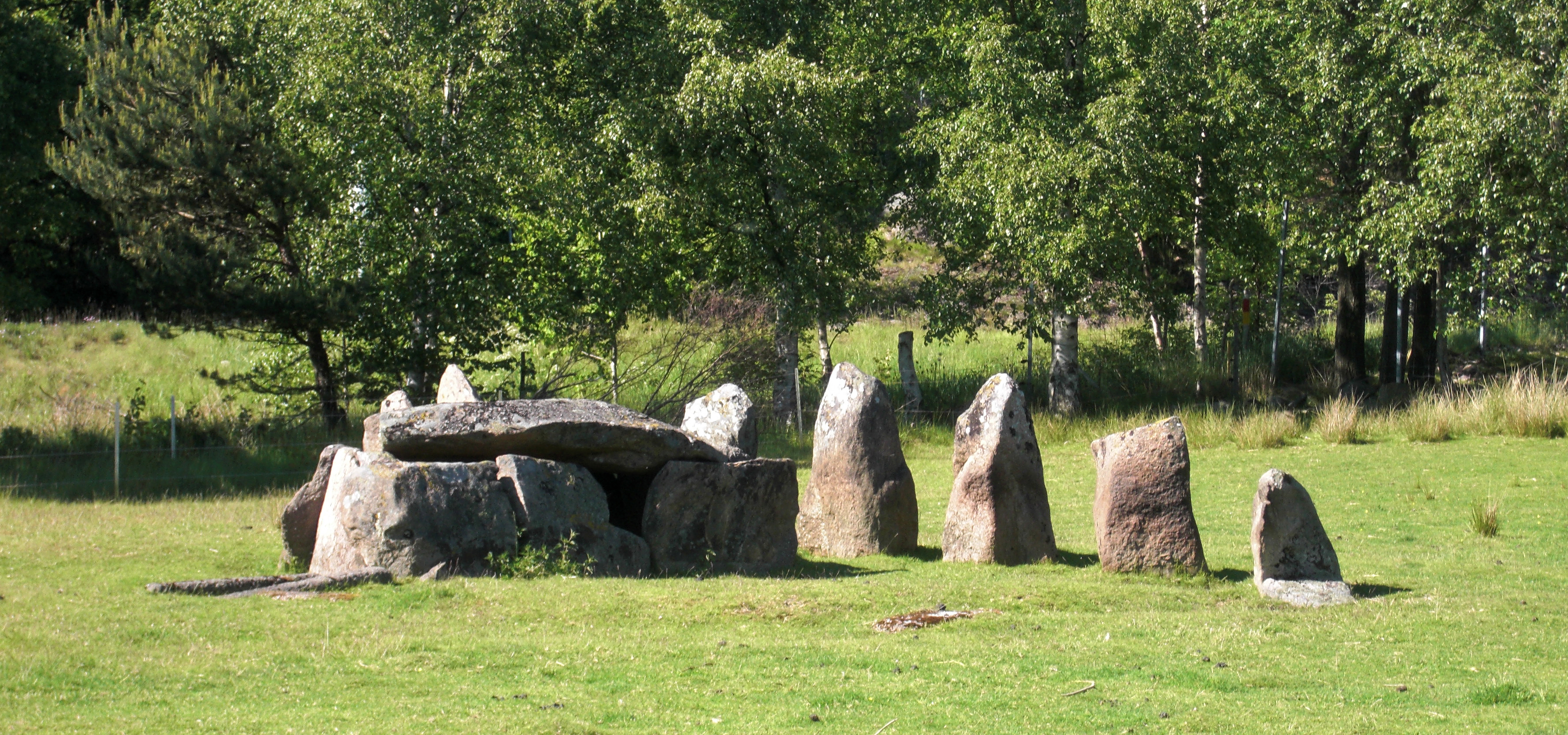 Den neolitiska dösen Drottning Hackas grav (RAÄ-nr Säve 57:1) i Säve socken, Västra Hisings härad, Göteborgs kommun, Bohuslän, Västra Götalands län, Sverige.